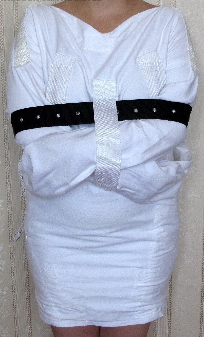 Пример рукавной медицинской смирительной рубашки с грудной и подмышечными петлями. С рубашкой используется локтевой ремень для повышения надежности фиксации при транспортировке пациентки.